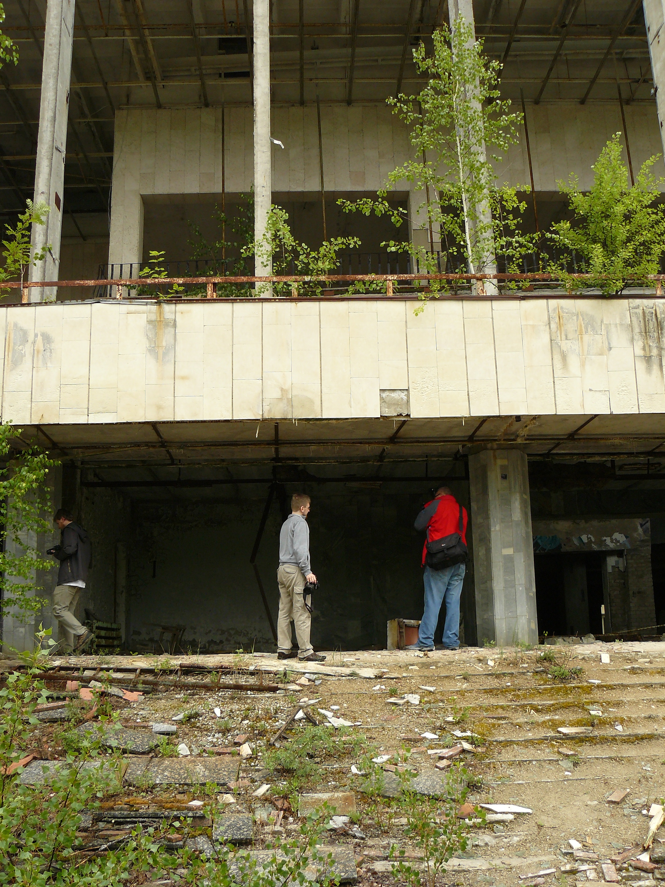 Вікіекспедиція до Чорнобильської зони. Прип'ять